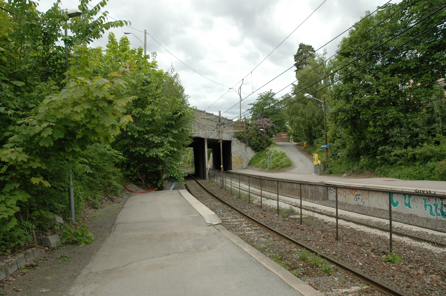 Lysakerelven stasjon, på Øraker i Oslo. I bruk 1942 - 2006. Foto: kjetil bjørnsrud, 2005